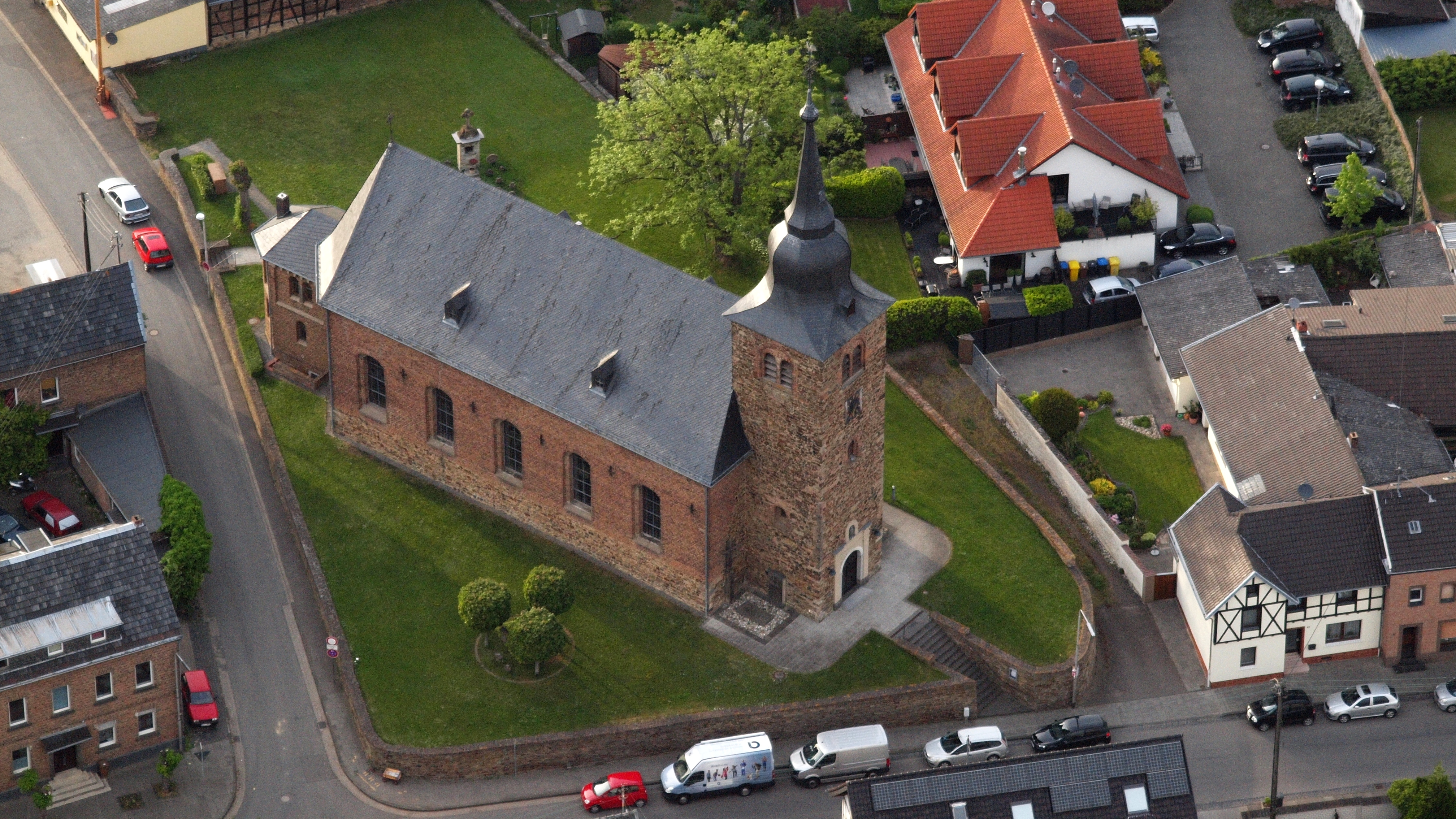 Kath. Pfarrkirche St. Walburgis, Gelsdorf, Gemeinde Grafschaft